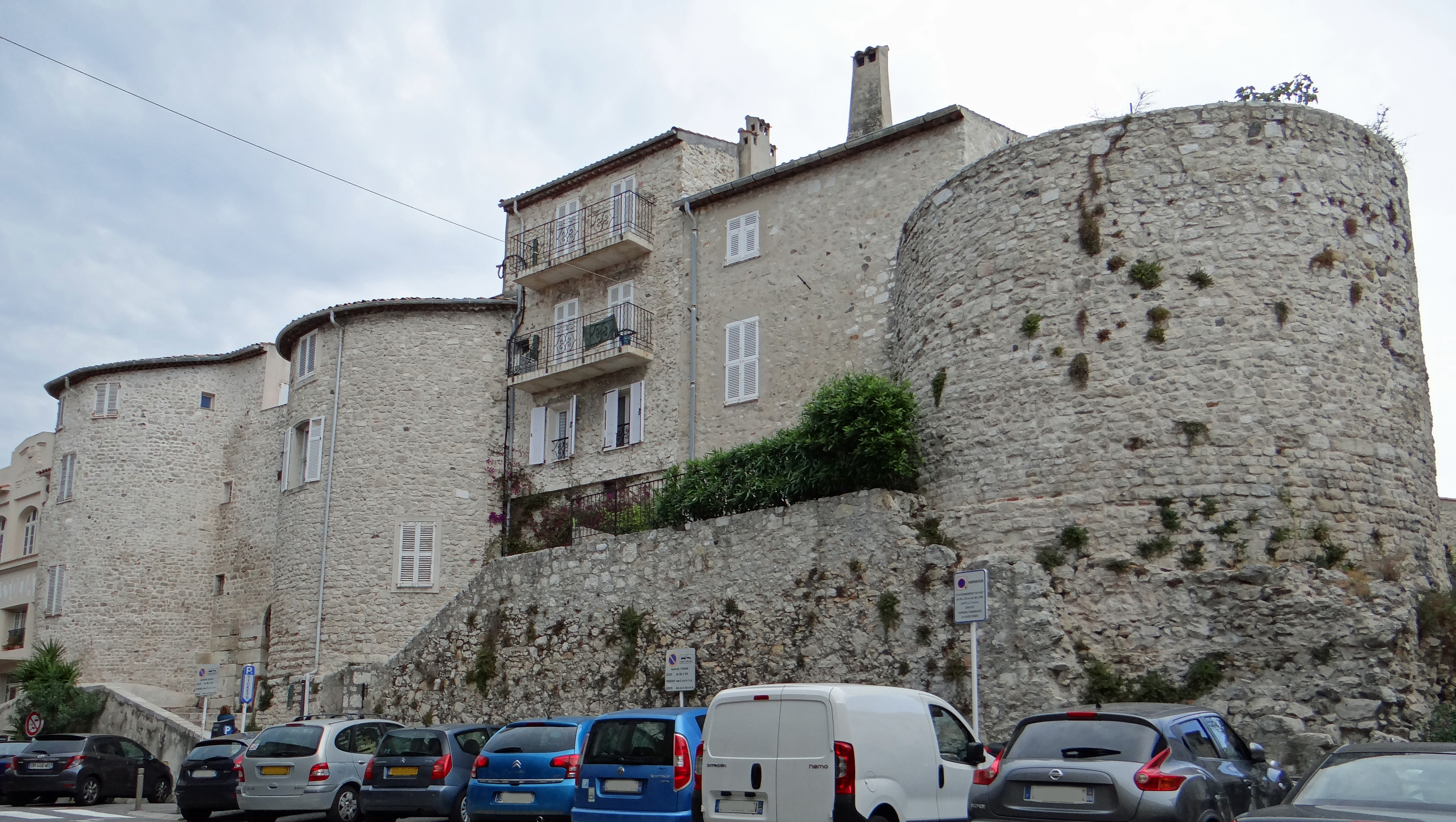 Antibes - Vestiges de l'enceinte gréco-romaine d'Antibes : la Tourraque et la porte de l'Orme